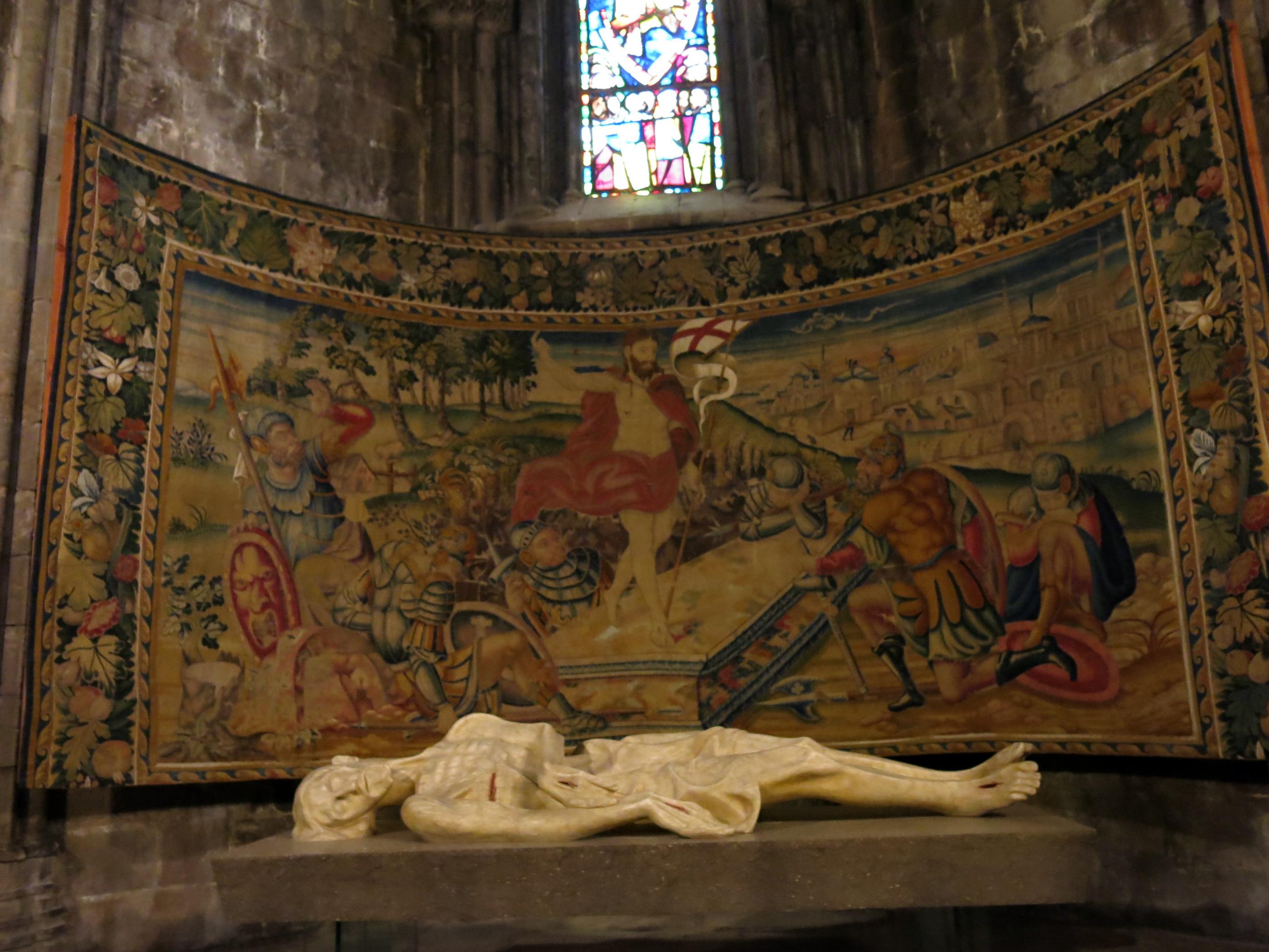 Catedral de Santa Maria (Girona)